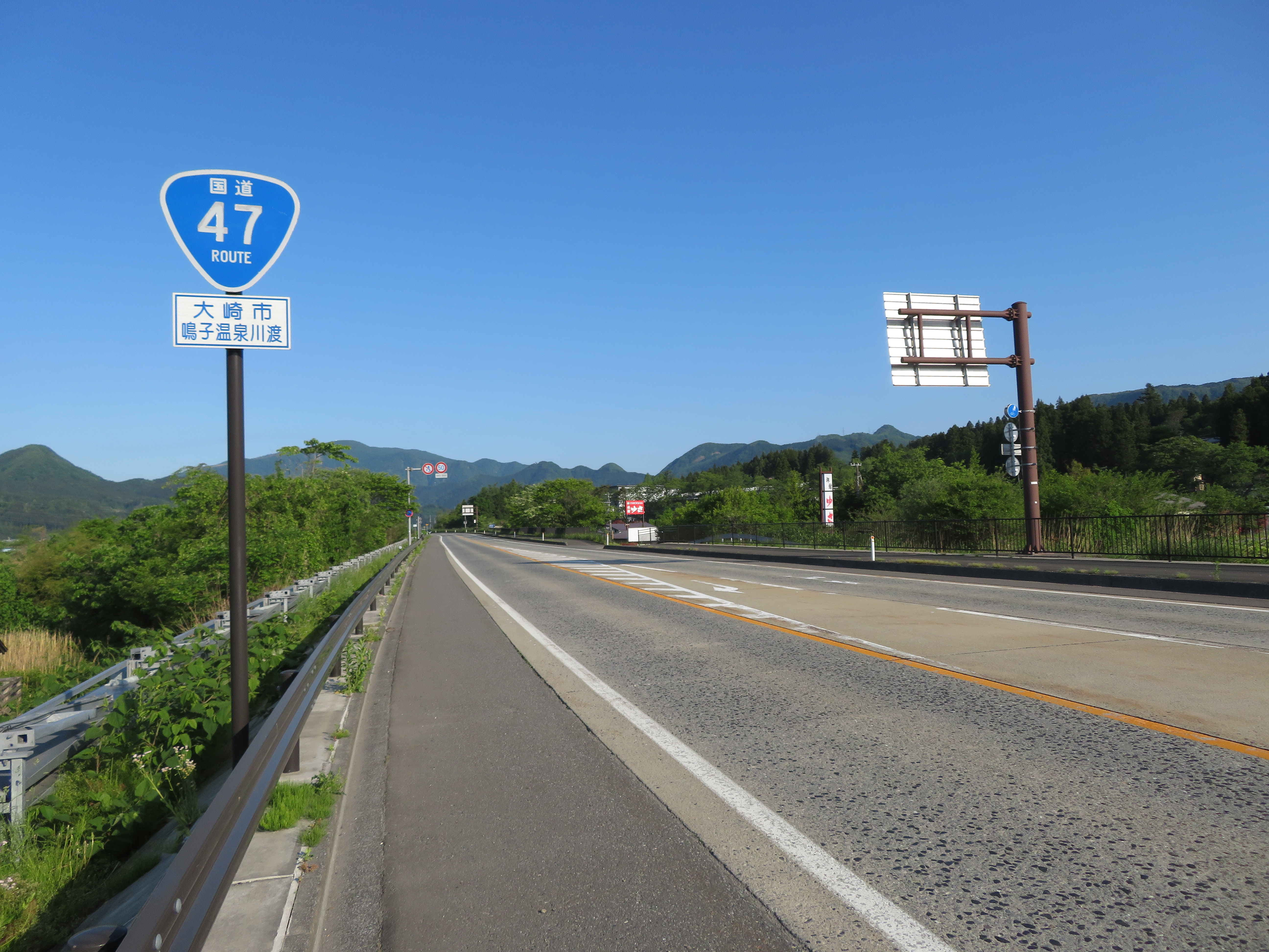 国道47号川渡バイパス宮城県大崎市鳴子温泉川渡付近（鳴子温泉方面を撮影） Canon PowerShot SX720 HS